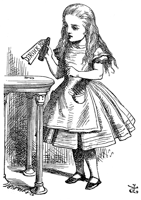 Illustration d'origine (1865), par John Tenniel (28 février 1820 – 25 février 1914), du roman de Lewis Carroll, Les Aventures d'Alice au pays des merveilles.